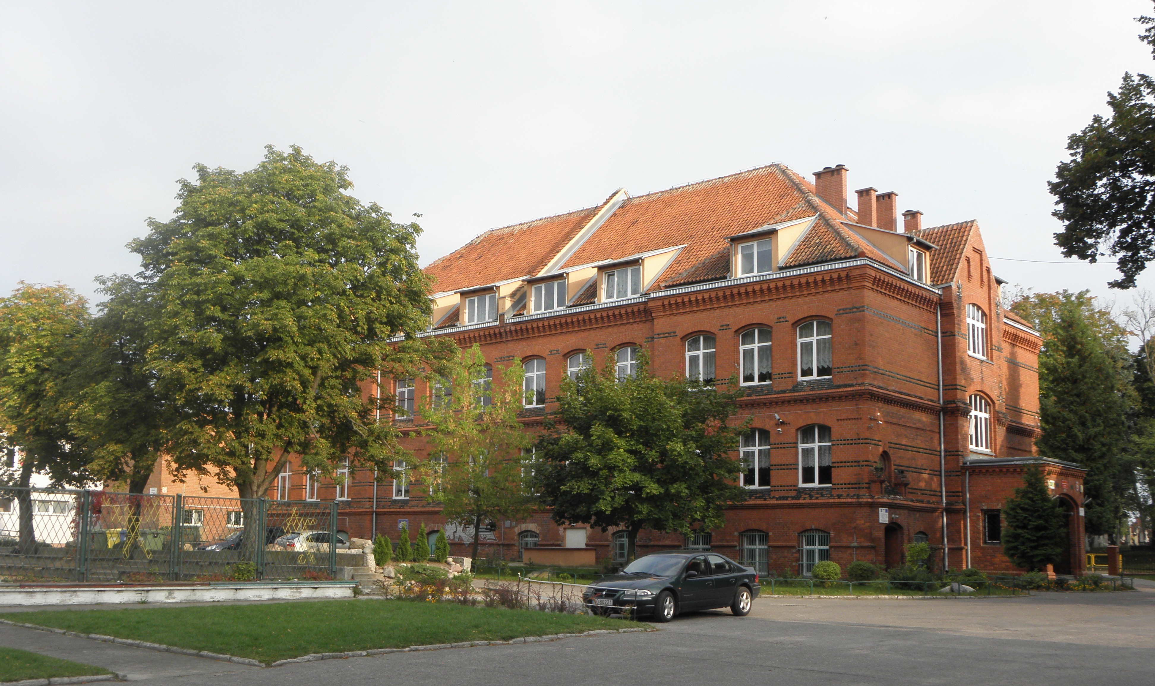 Budynek Szkoły Podstawowej nr 3 w Biskupcu. Gmina Biskupiec, powiat olsztyński.